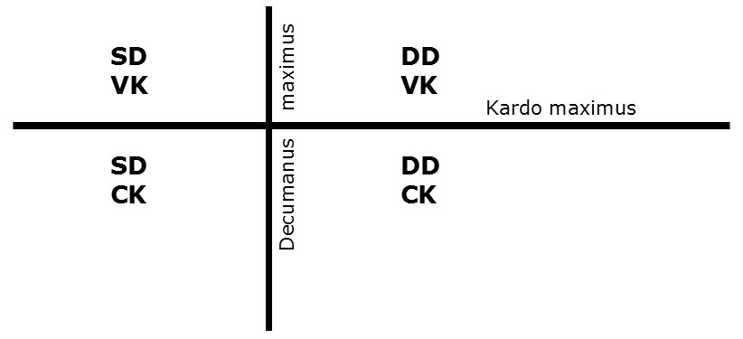 Schema von Decumanus und Kardo auf dem römischen Katasterplan B von Orange (Vaucluse), Frankreich